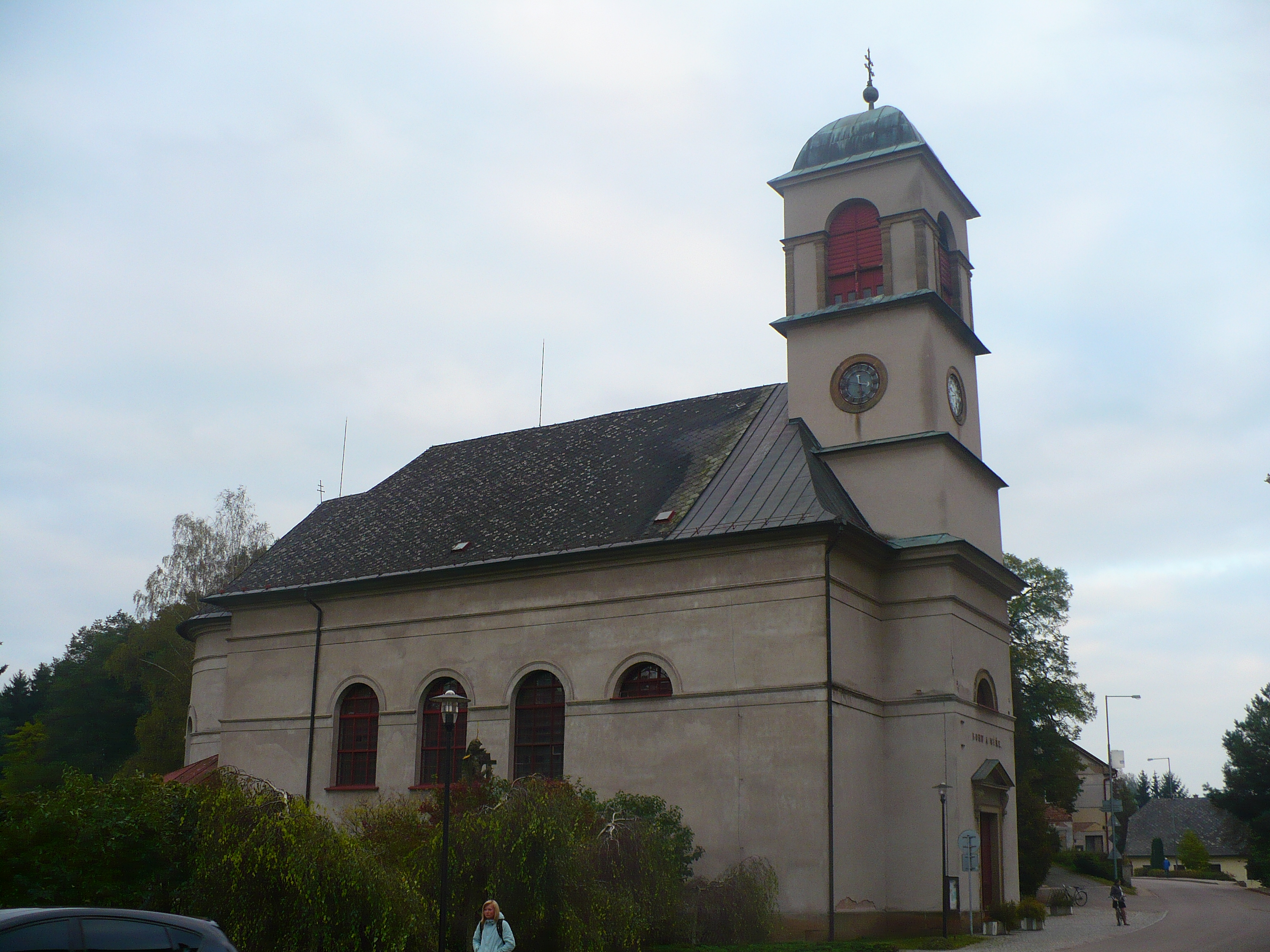 Kostel sv. Mikuláše v obci Dolní Dobrouč